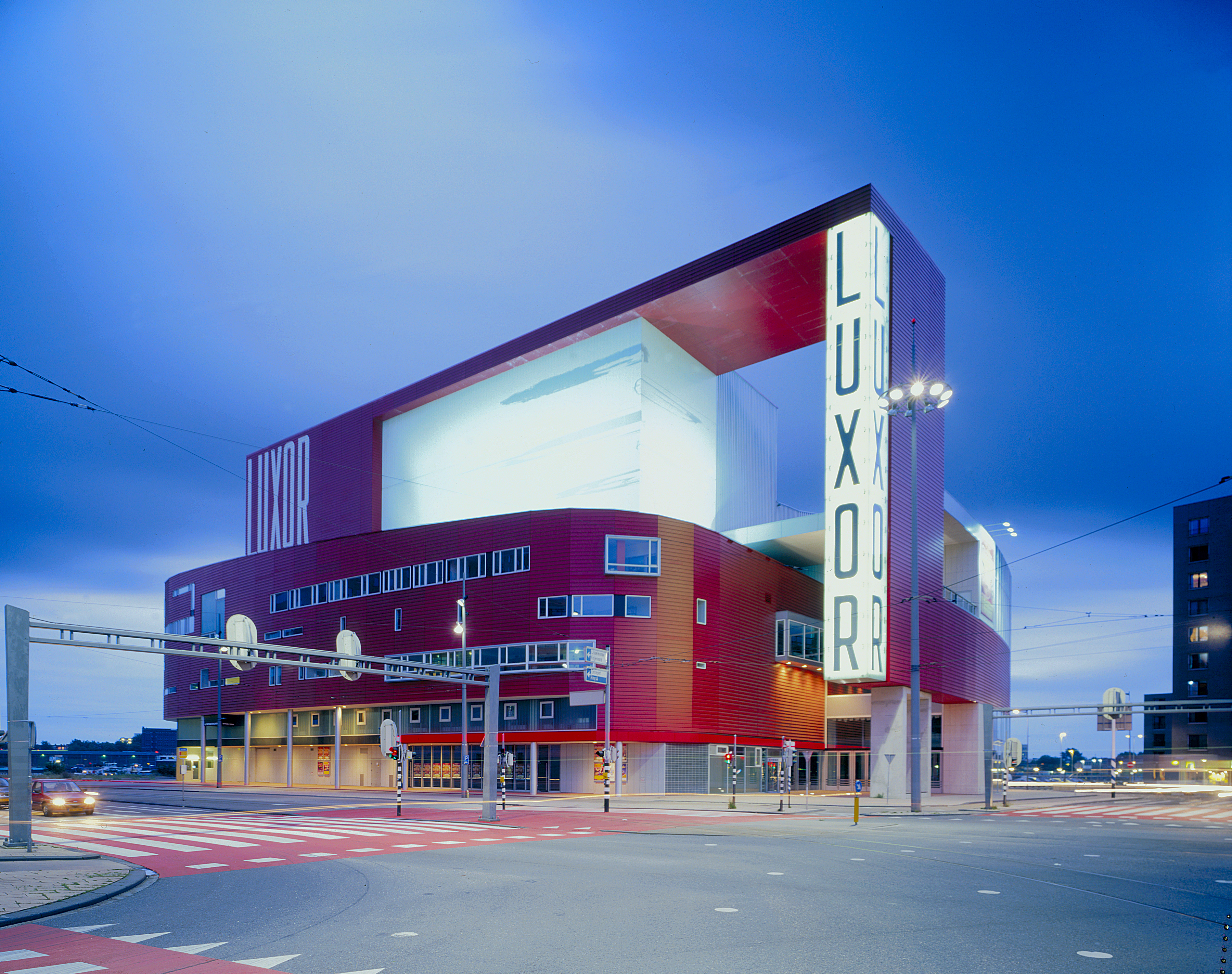 Aan de voet van de Erasmusbrug op de Kop van Zuid in Rotterdam